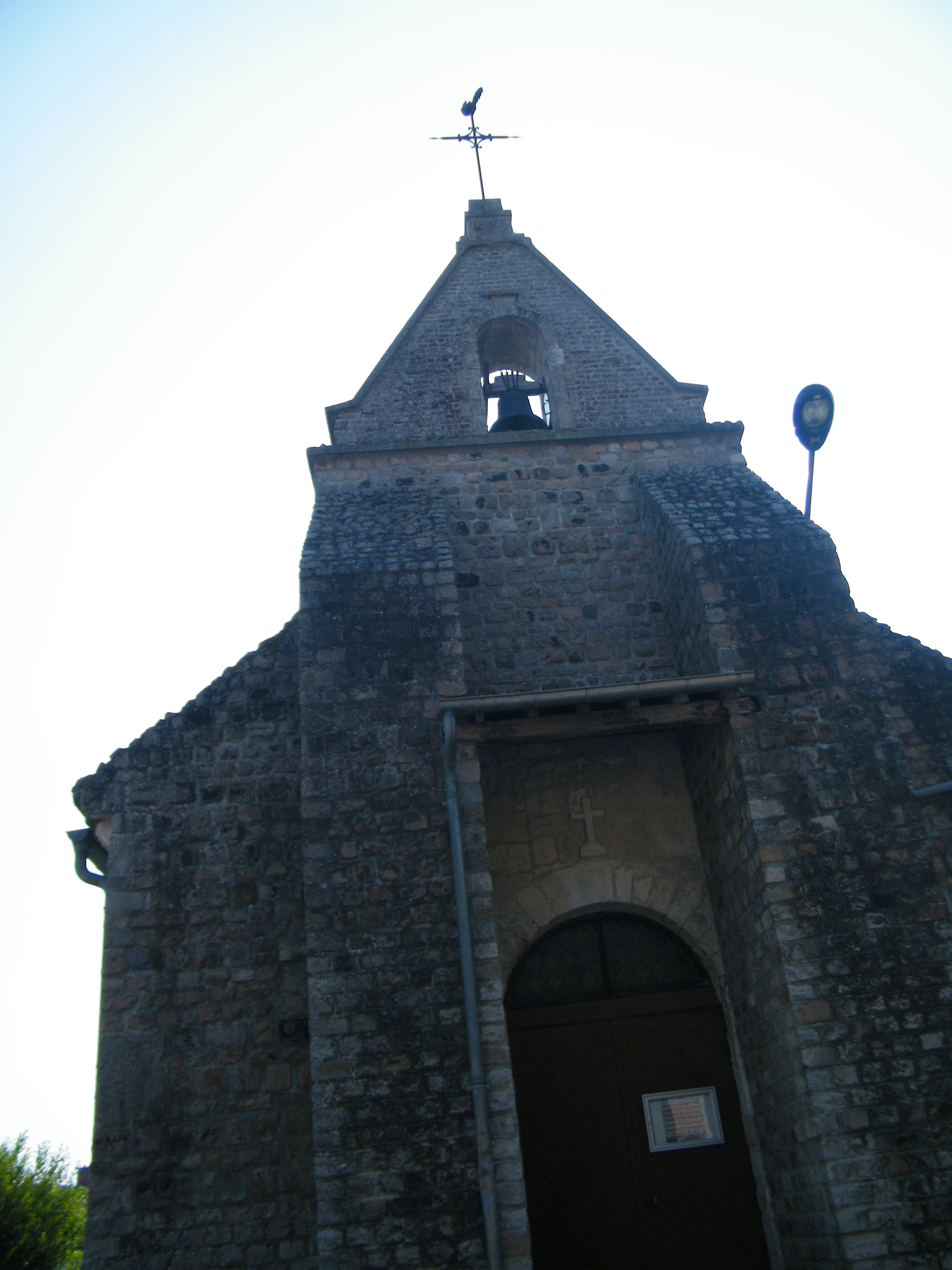 église.